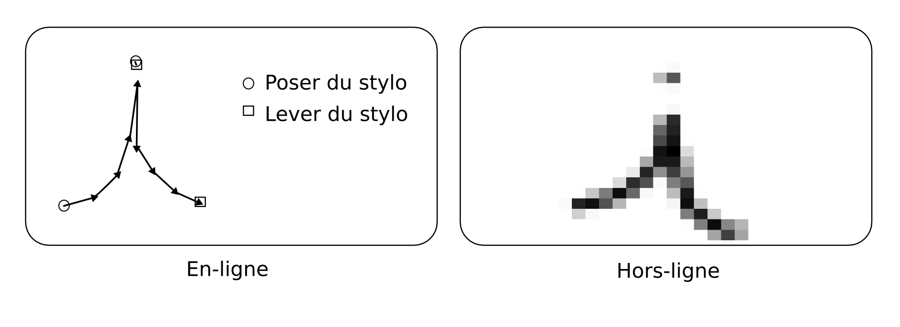 Échantillon d'encre numérique en-ligne et hors-ligne Auteur : Emmanuel User:manproc Prochasson